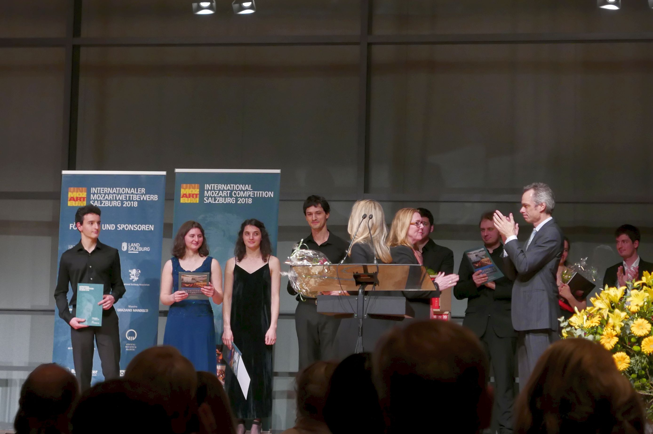 Internationaler Mozartwettbewerb 2018 Streichquartett Preisverleihung: Quatour Tchalik (1. Preis); Interim. Rektorin Sarah Wedl-Wilson (Mitte); Benjamin Schmid (rechts)